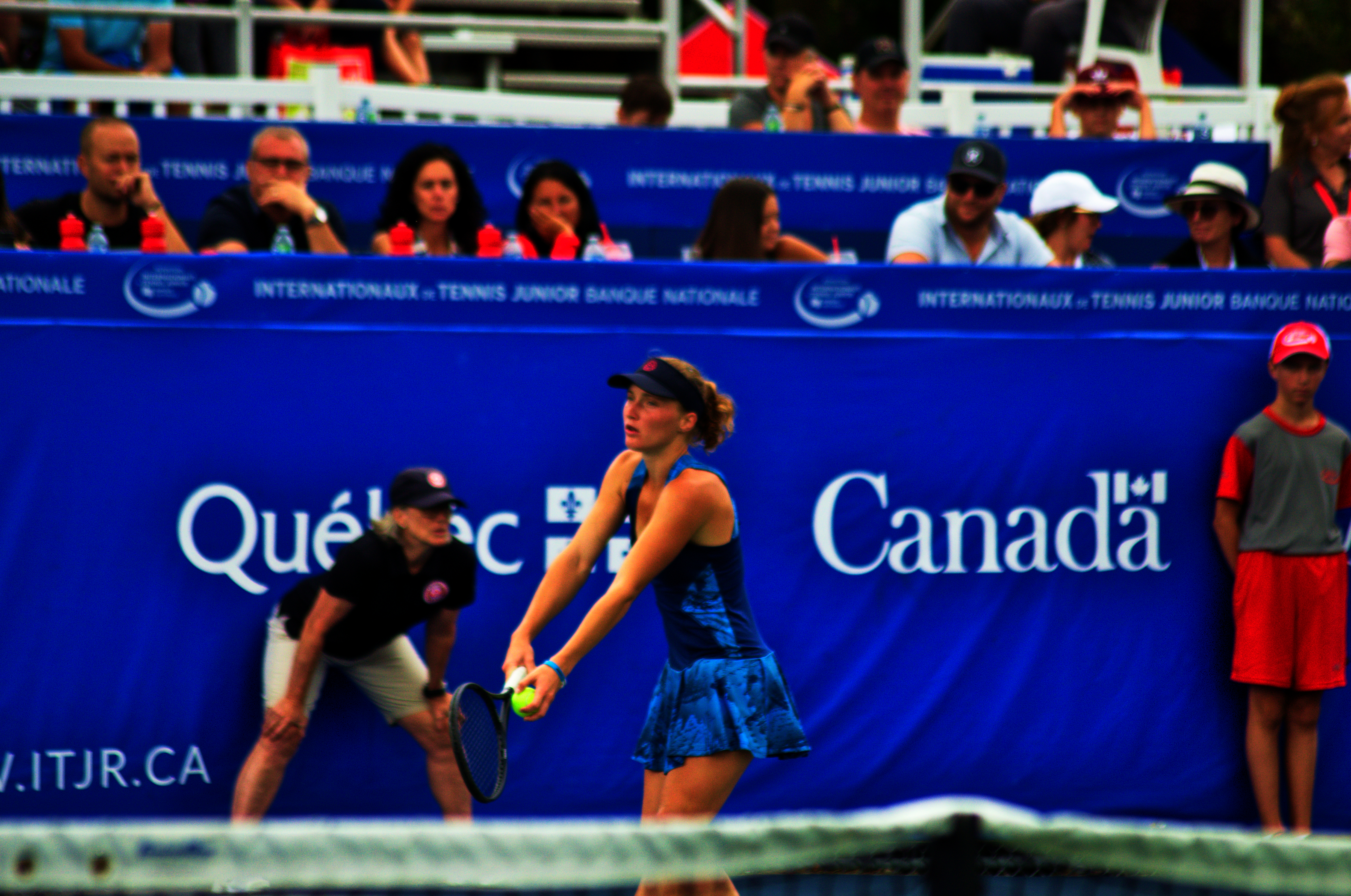 canada, Finale itf junior J1, Repentigny